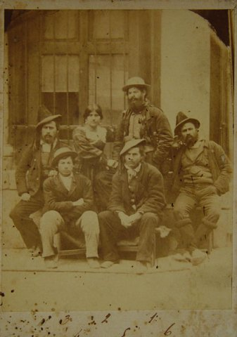 Banda del brigante Antonio Franco